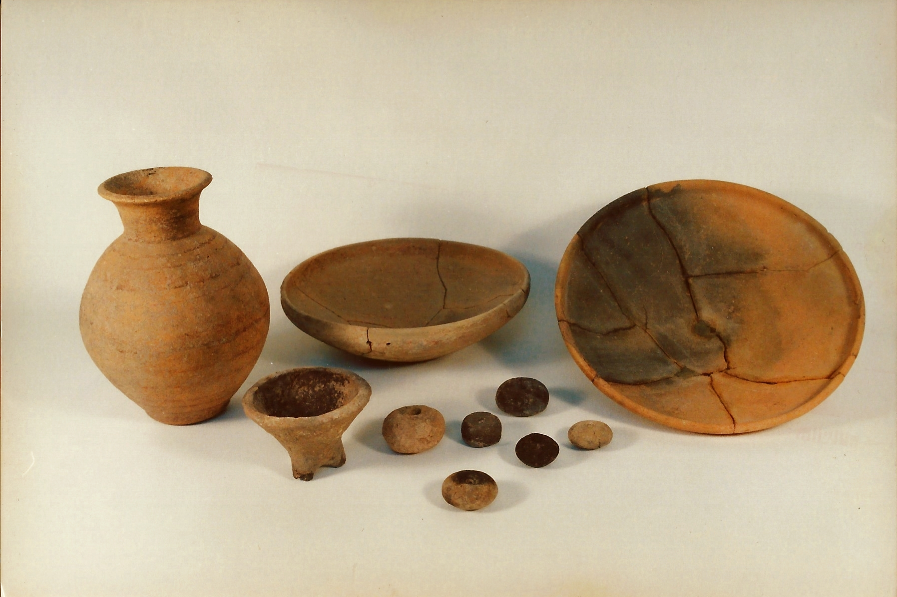 Selección de materiales de l'Alt de Benimaquia, departamento 6, fechados en 600 - 560 a.C.